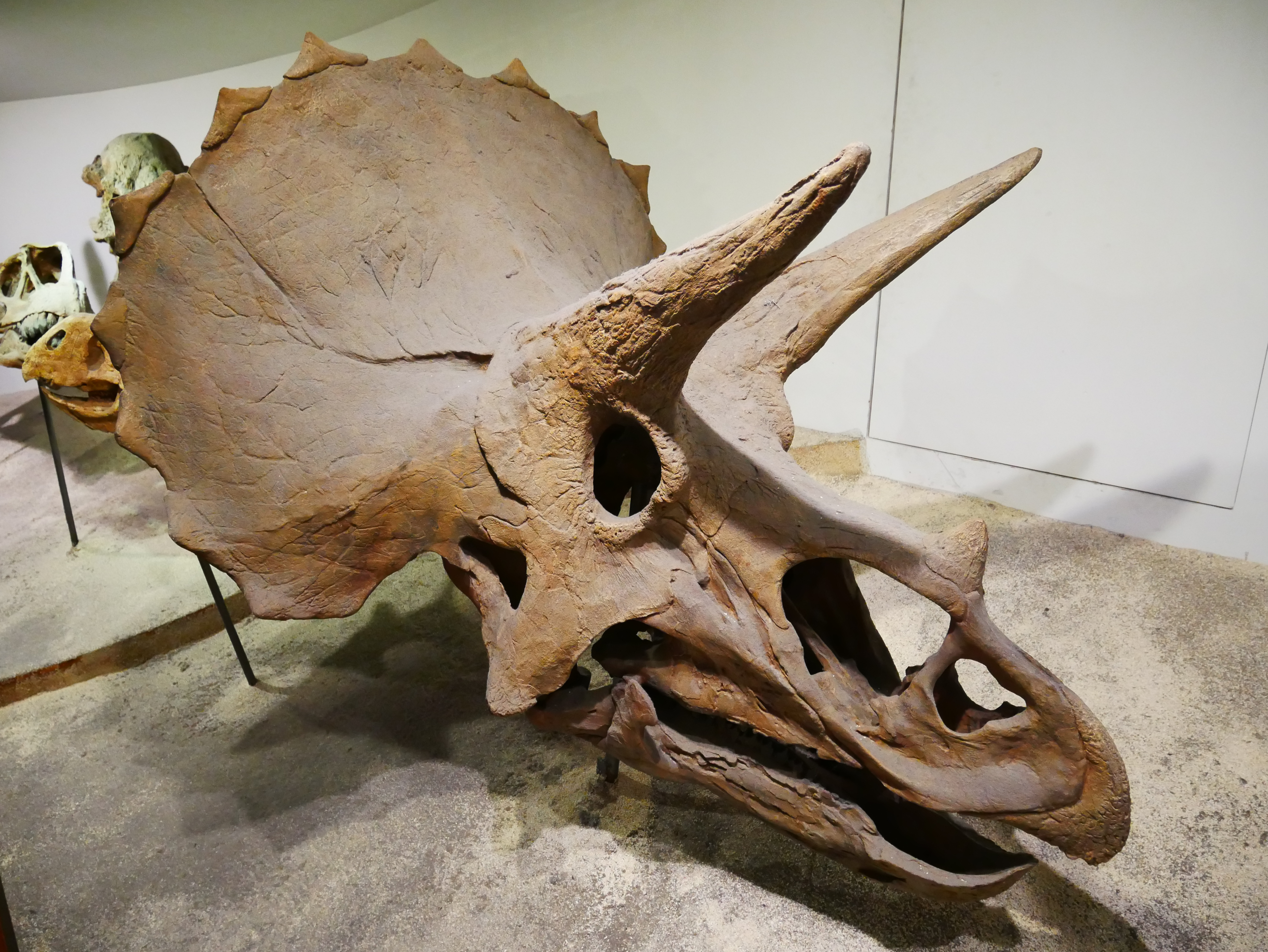 三角龍屬頭骨側影，臺北市中正區城內次分區黎明里